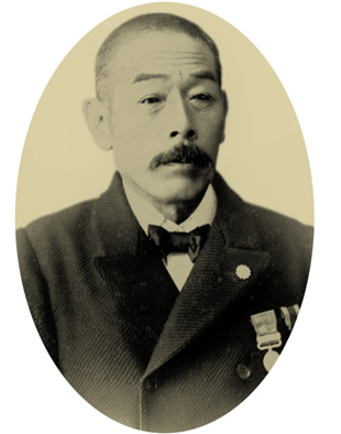 愛知県碧海郡出身の土木技師の服部長七。